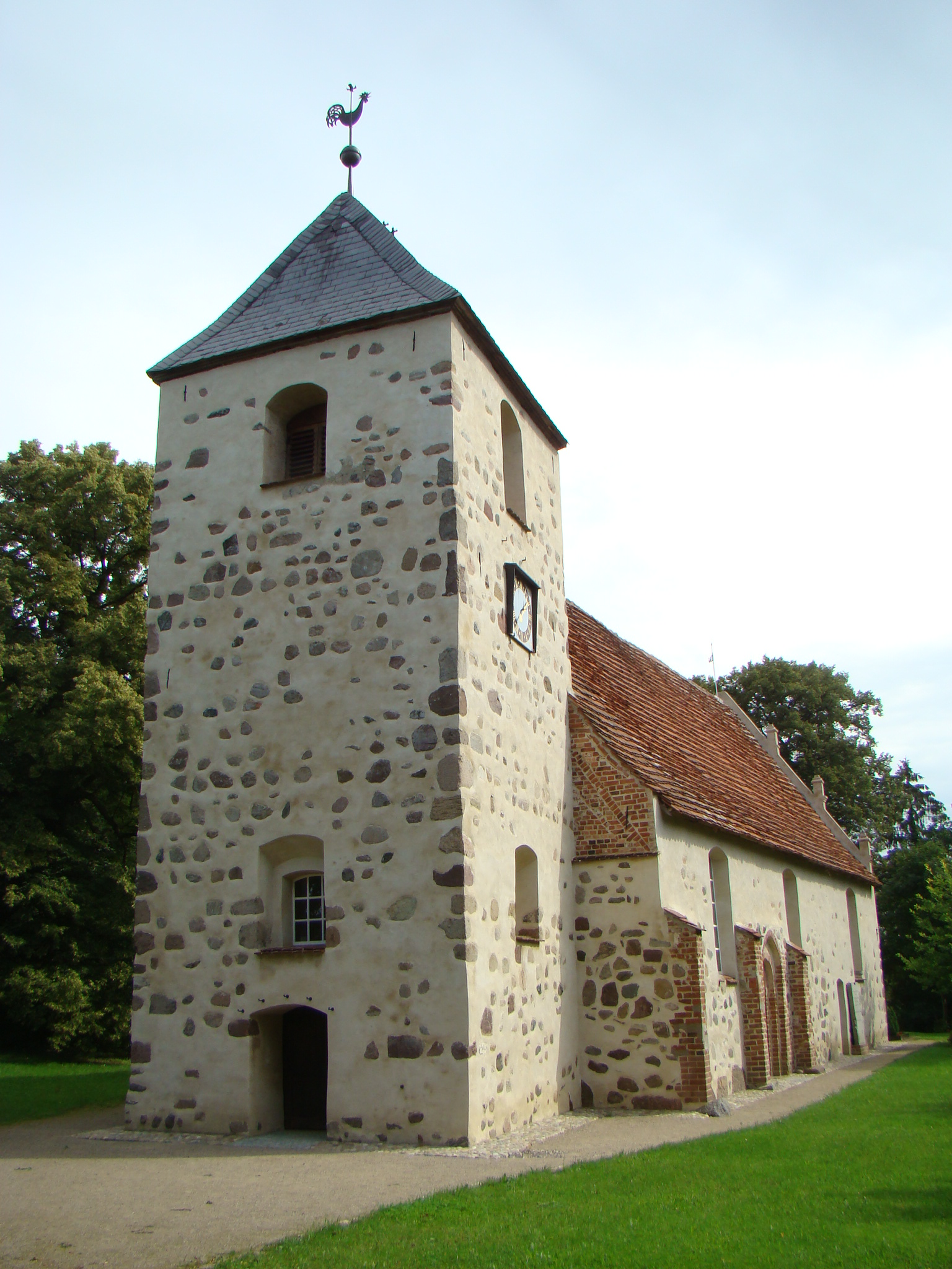 Kirche in Rambow. Foto: Peter Schmelzle, August 2011